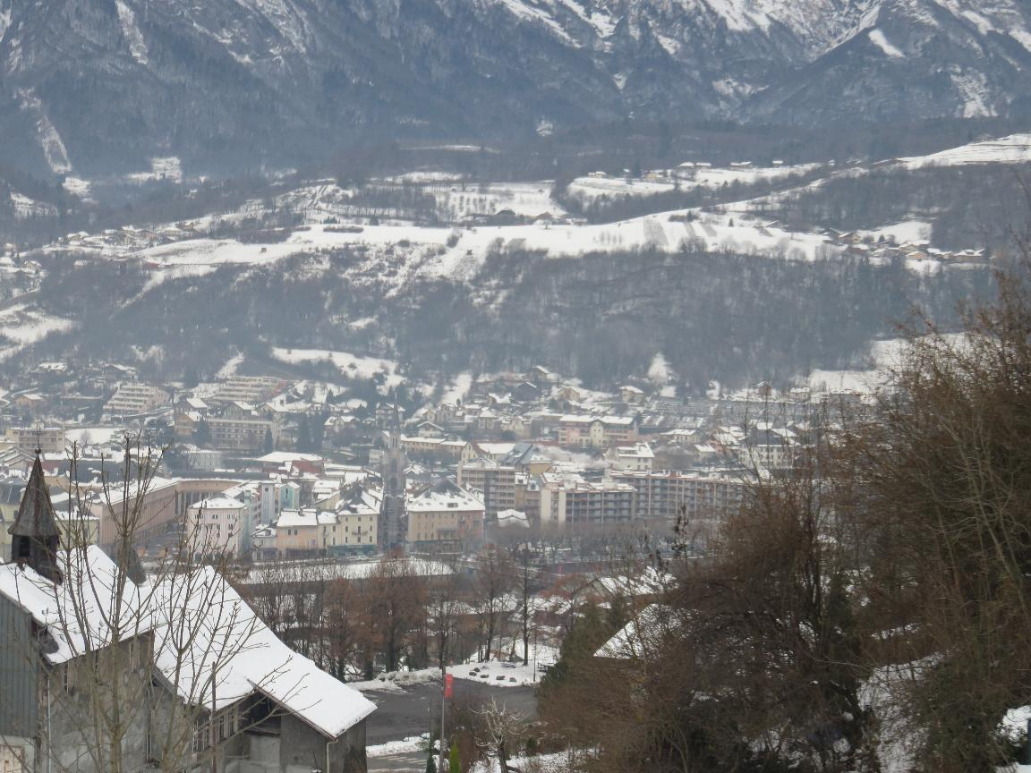 Image du centre ville d'Albertville